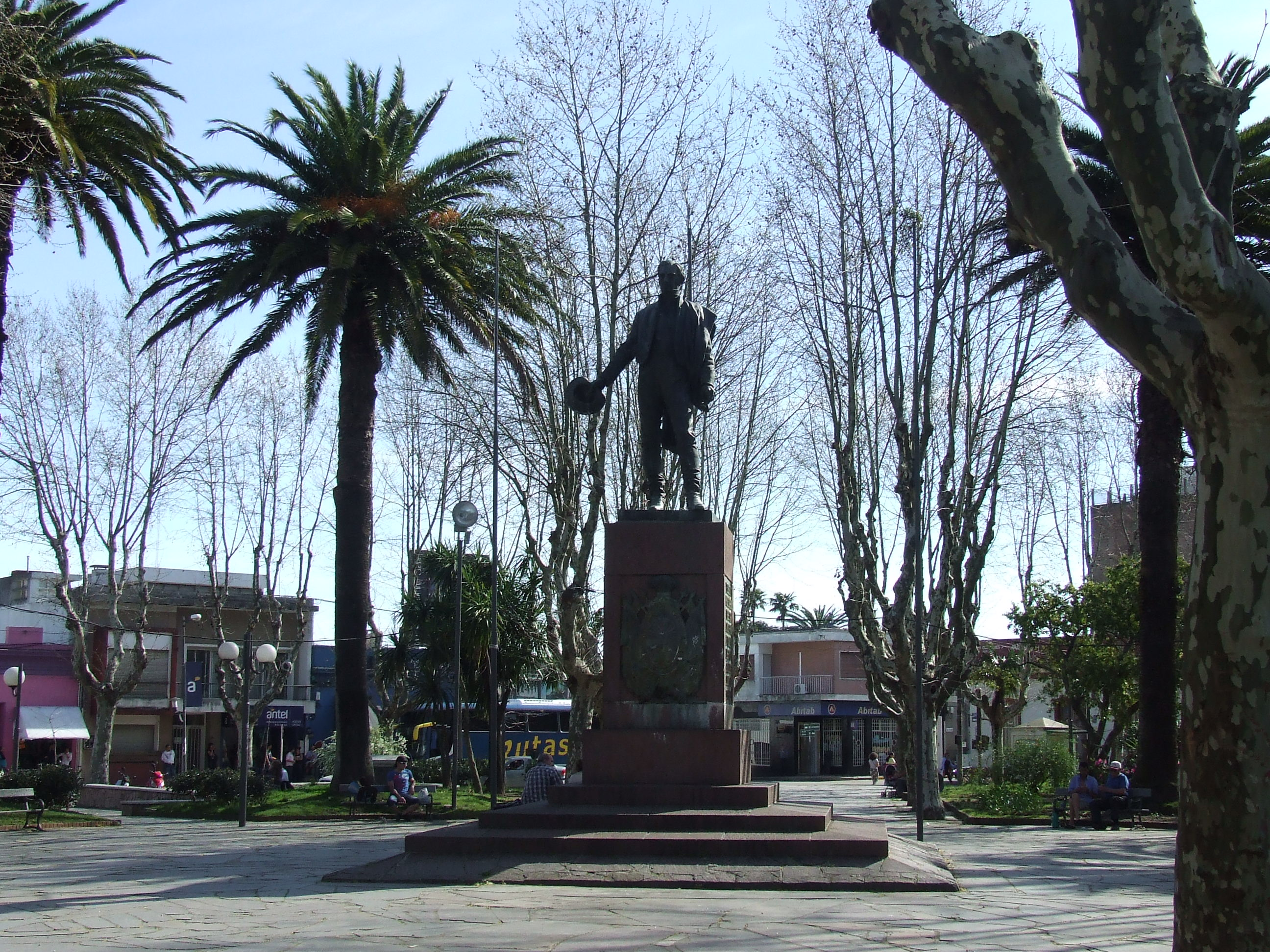 Monumento a Artigas (Rocha). Ubicada en el departamento de Rocha